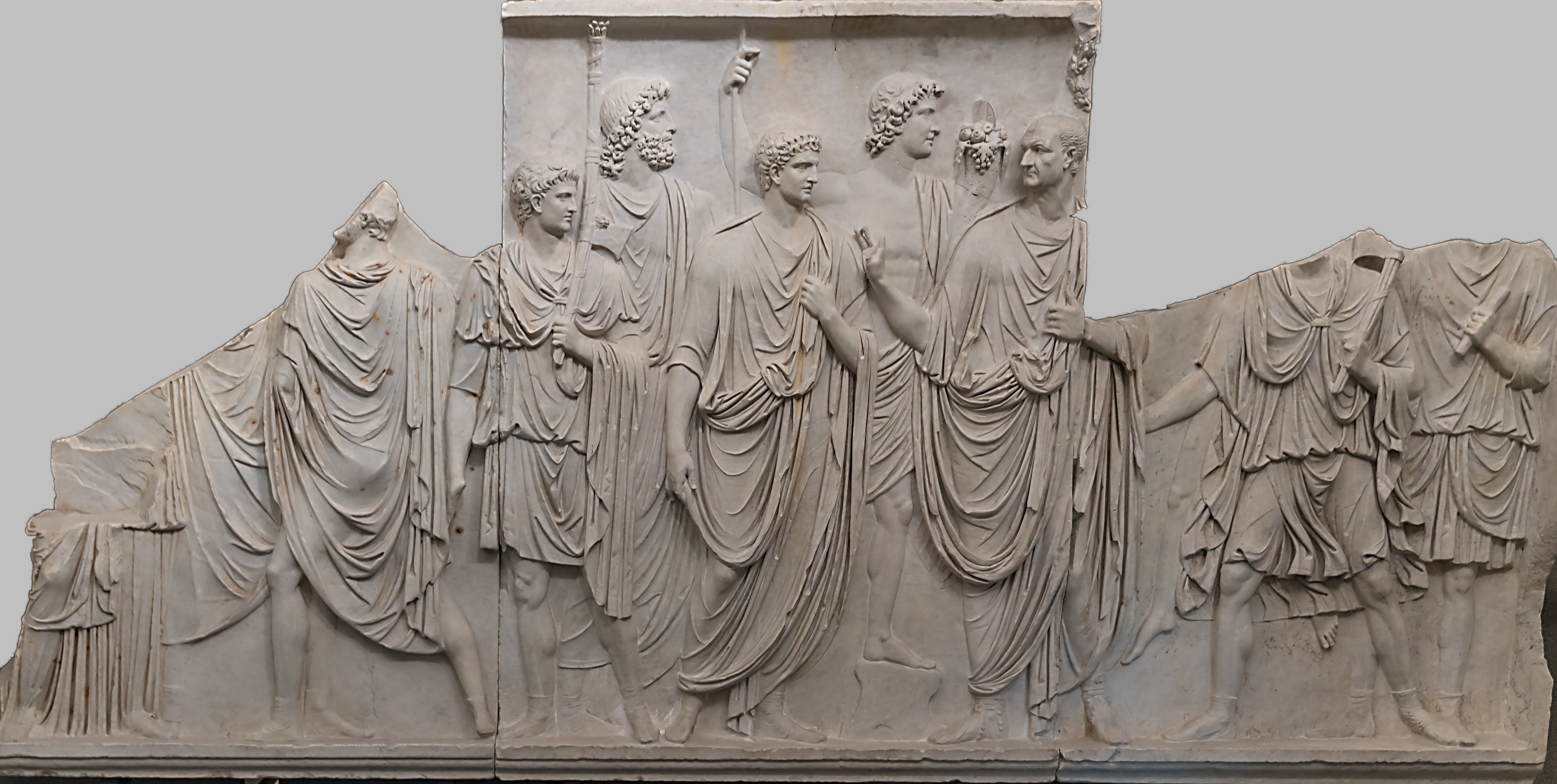 Cancelleria-Relief, Fries -B-, entdeckt zwischen 1937 und 1939 in Rom, unter dem Palazzo della Cancelleria Apostolica. Ausgestellt in den Vatikanischen Museen (Inv. 13392 -13395)